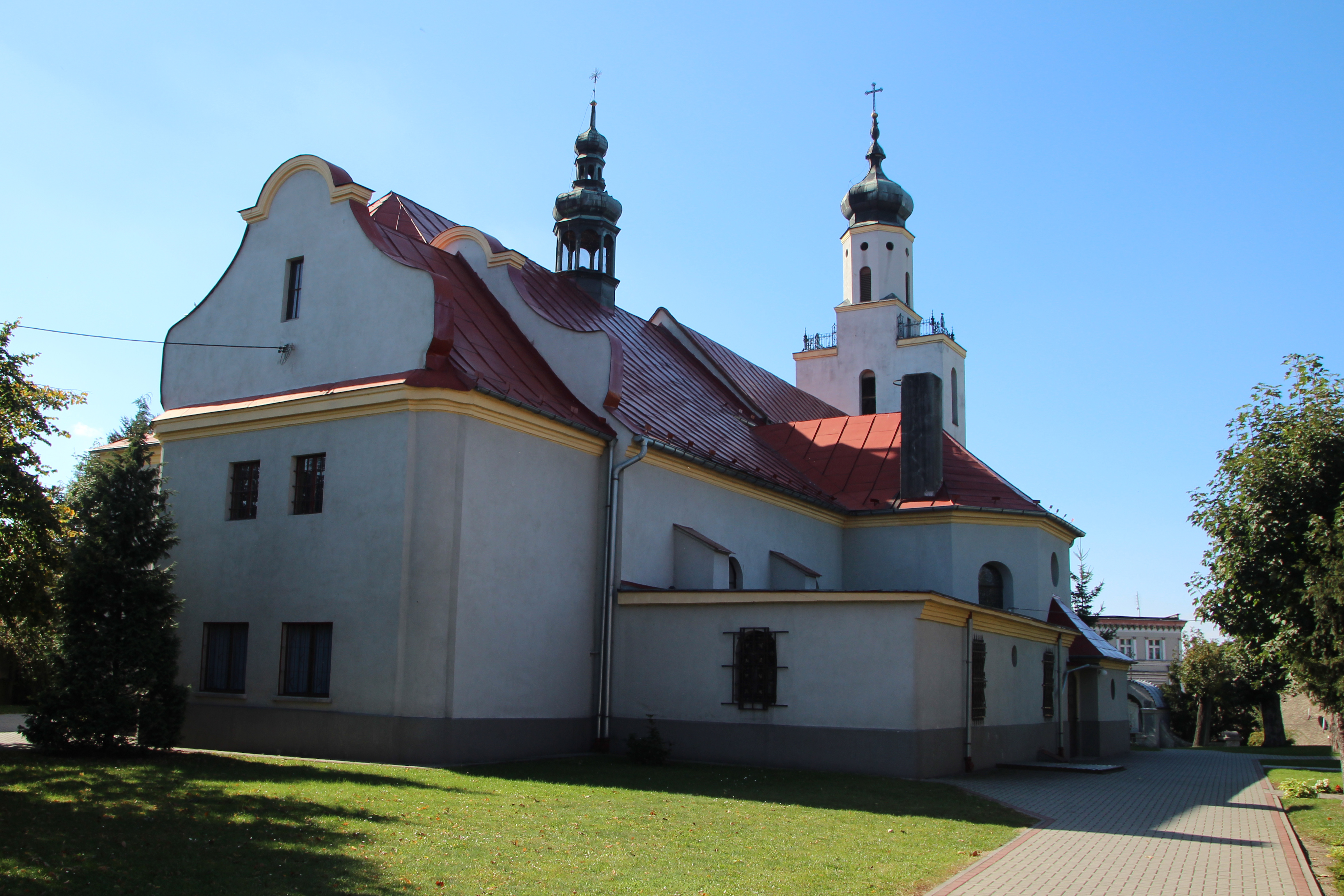 Baborów, ul. Dąbrowszczaków - rzymskokatolicki kościół parafialny pw. Narodzenia NMP, 1 poł. XIX w., 1922